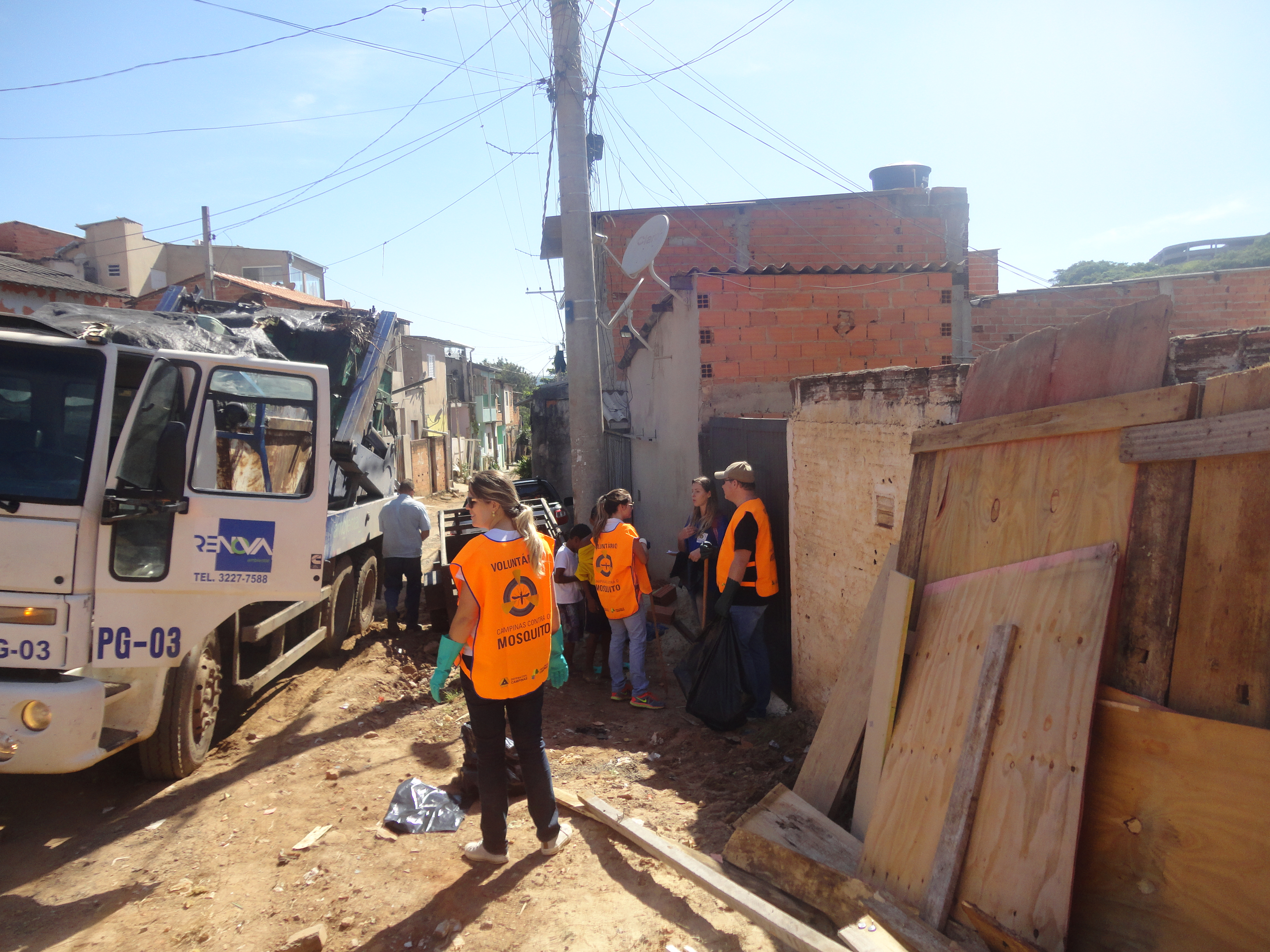 Natal sem Zika - Mutirão contra arbovirose